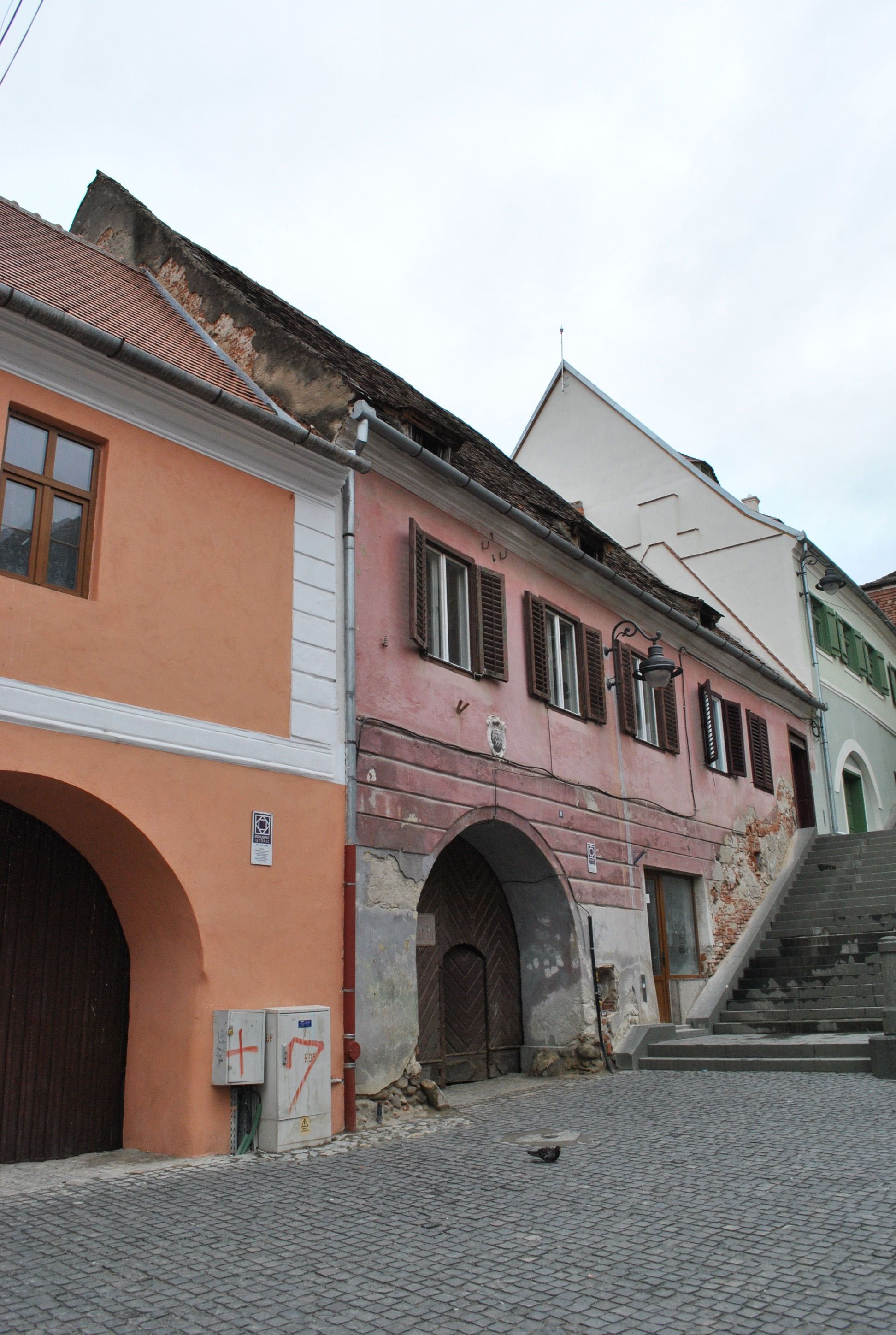 Casa Martin Wankel, sec. XIV, transf. 1704; 1925 - 1950